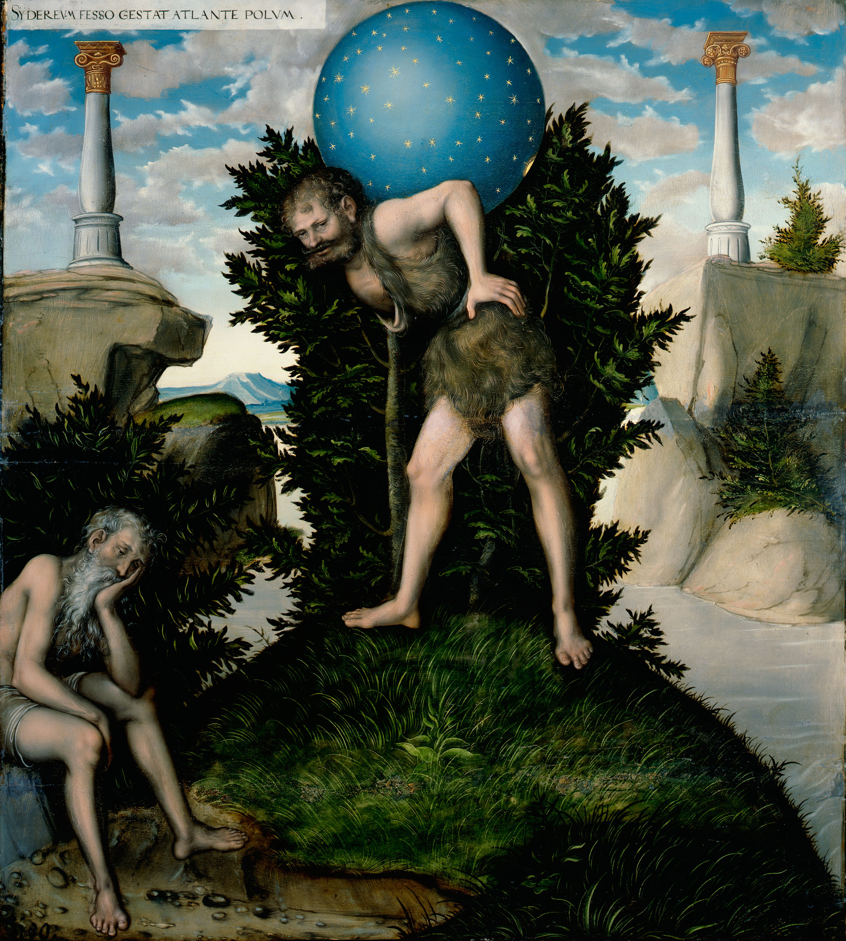 Bildfolge zur Herkules-Legende